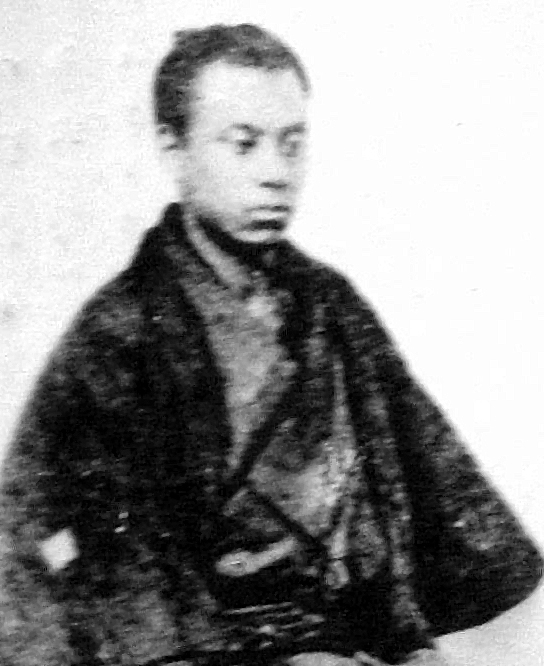 a Japanese man 佐々木高行 (Takayuki Sasaki)